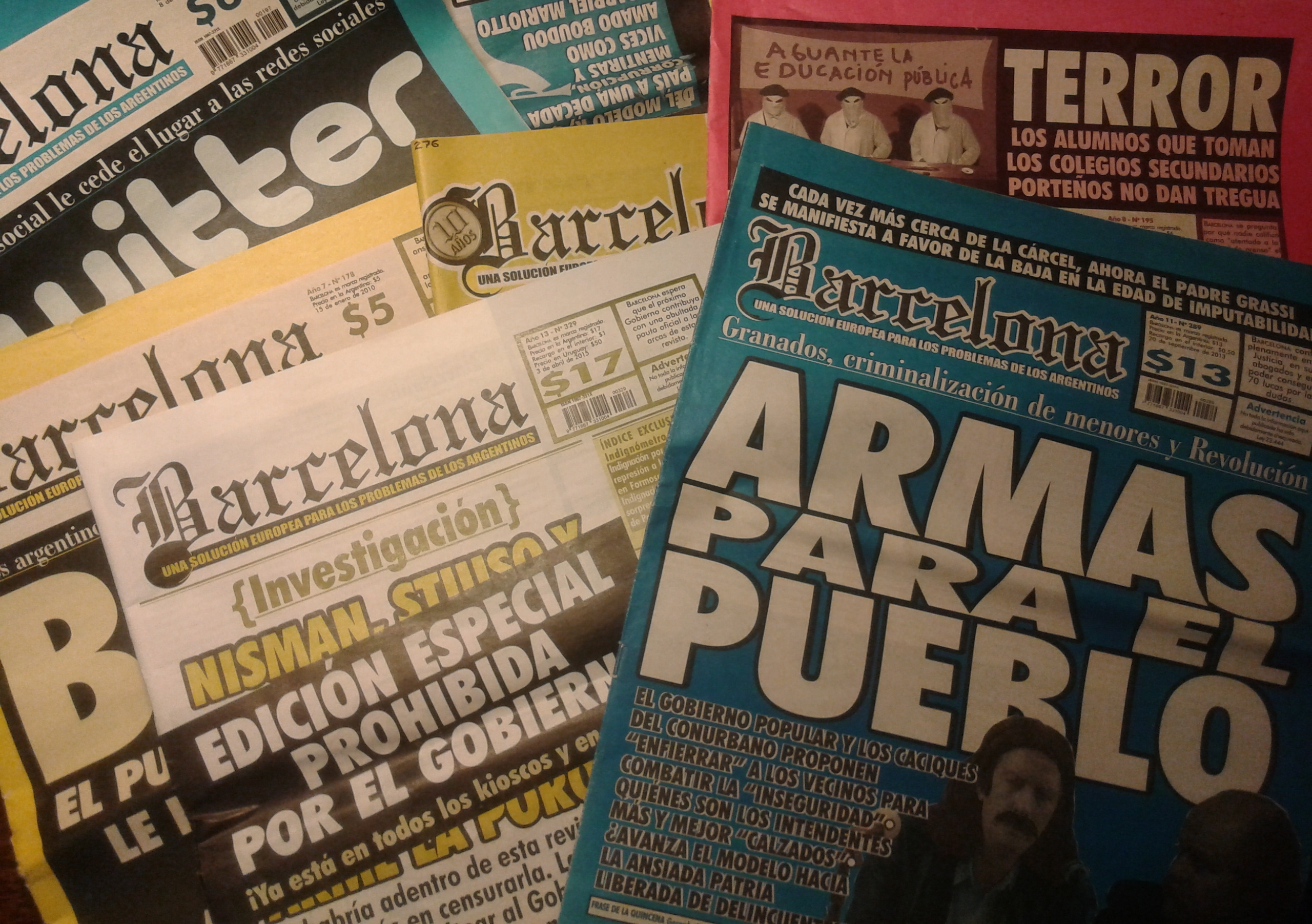 Publicación satírica argentina